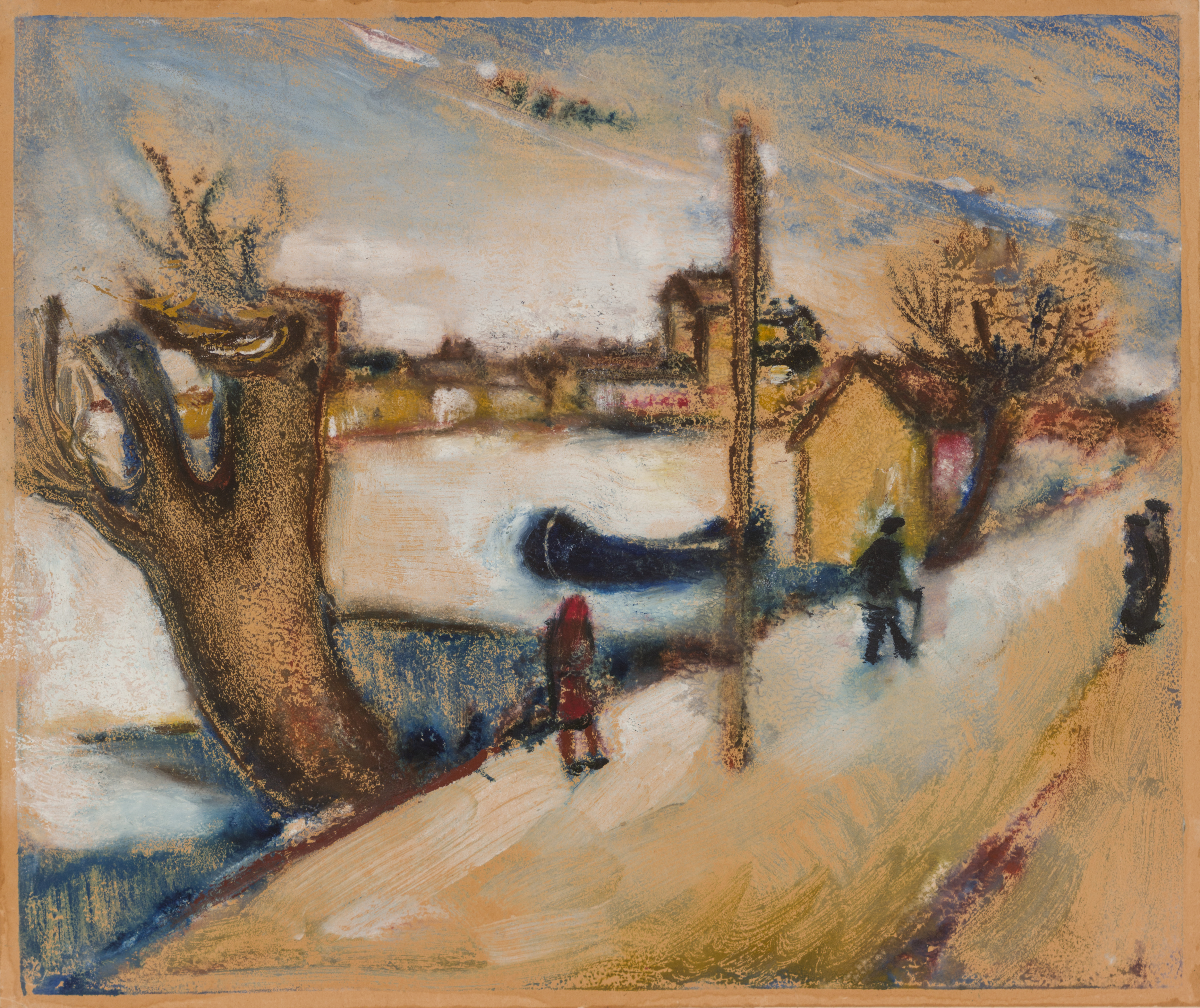 "Emajõgi". Ca 1935–1940. Monotüüpia. Kujutise kõrgus 36,5 cm ja laius 43,8 cm; lehe kõrgus 38,0 cm ja laius 45,3 cm. MUIS:TKM TR 1498 G 520 This image on crowdsourcing geotagging platform Ajapaik